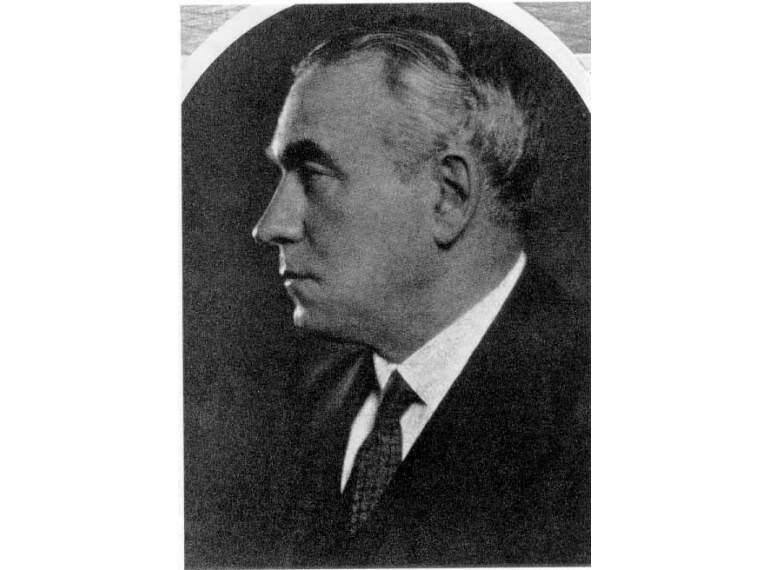 Salvador Echeandia Gal